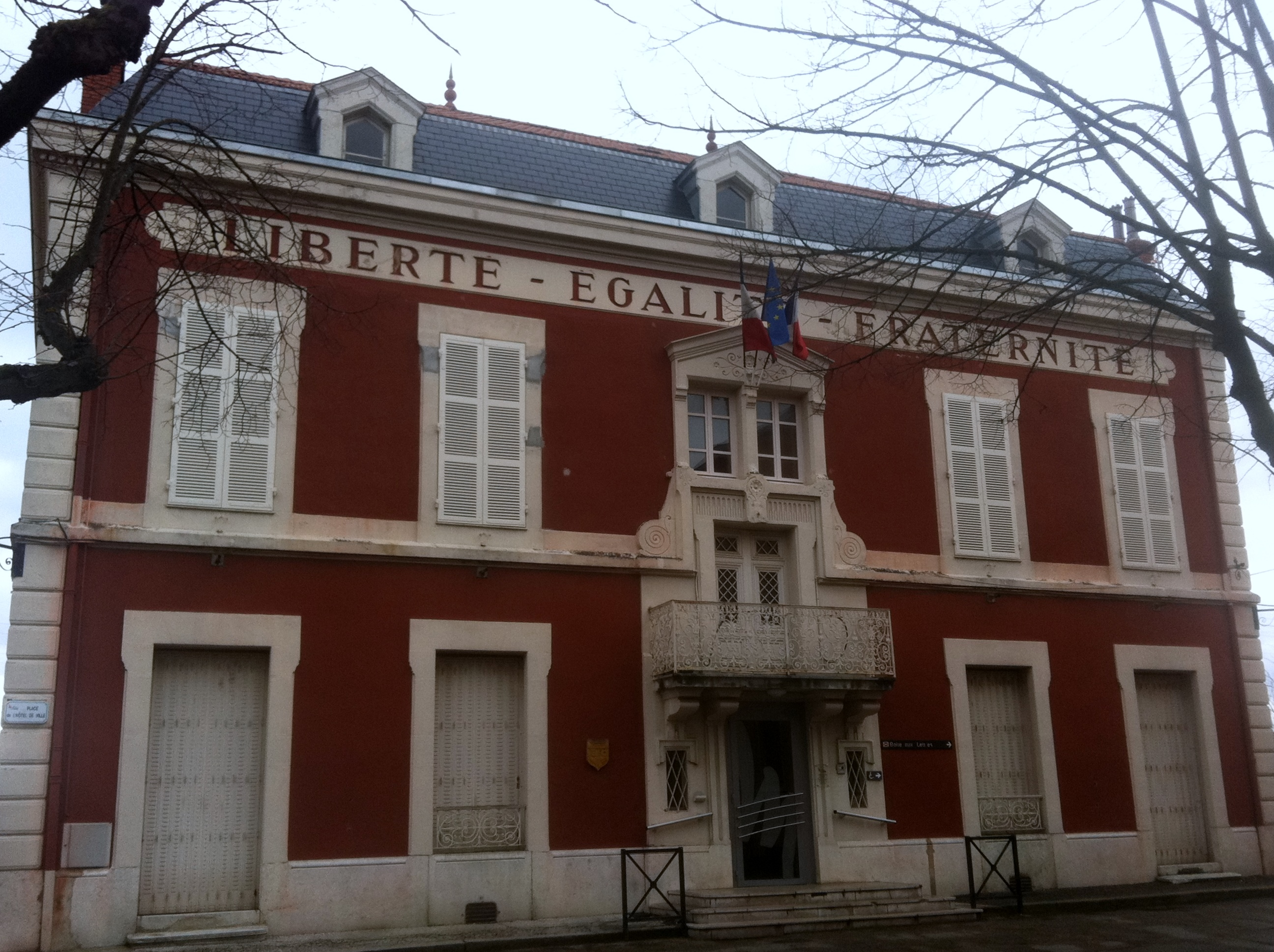 Mairie de Miribel, Ain, France.